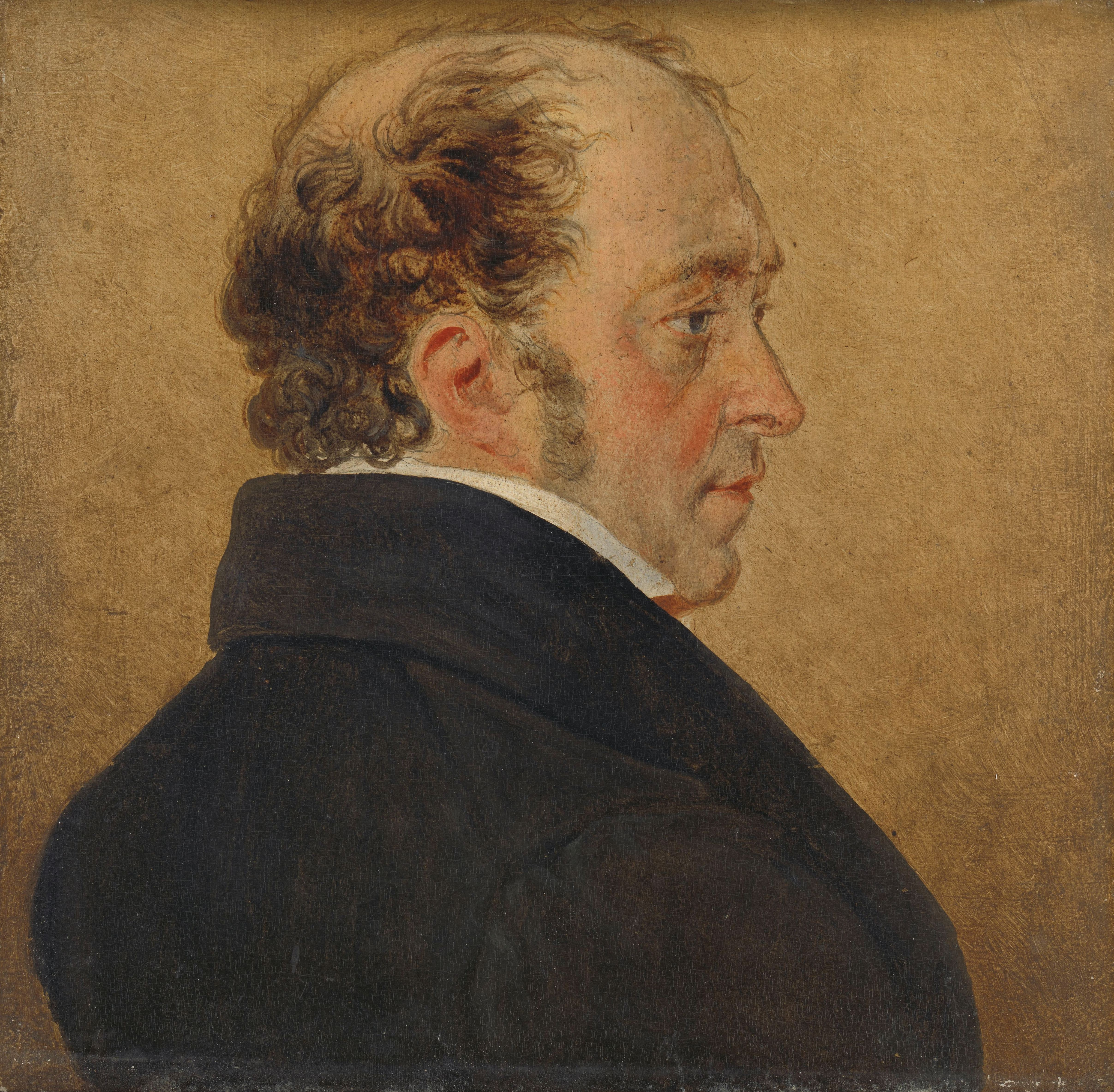 Zelfportret van de schilder Mattheus Ignatius van Bree.